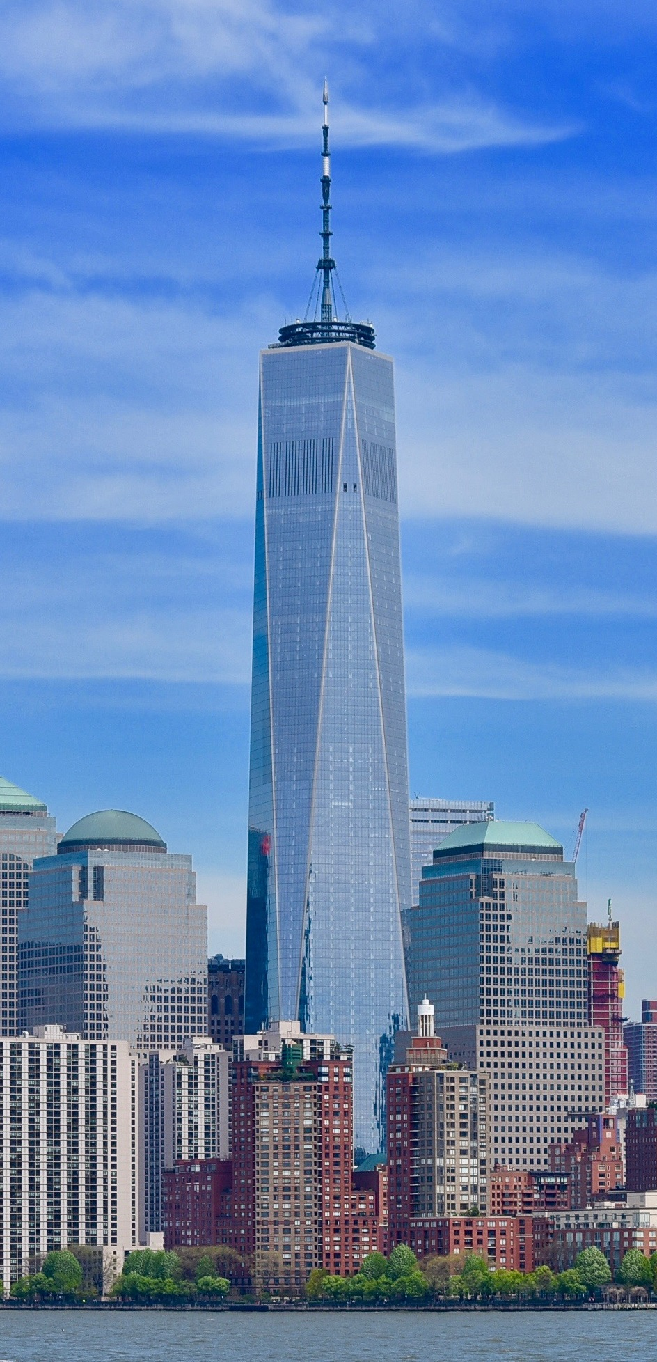 Vista One World Trade Center, desde el Río Hudson, New York, United States of America. Edificio construido después del derrumbamiento de las torres gemelas.